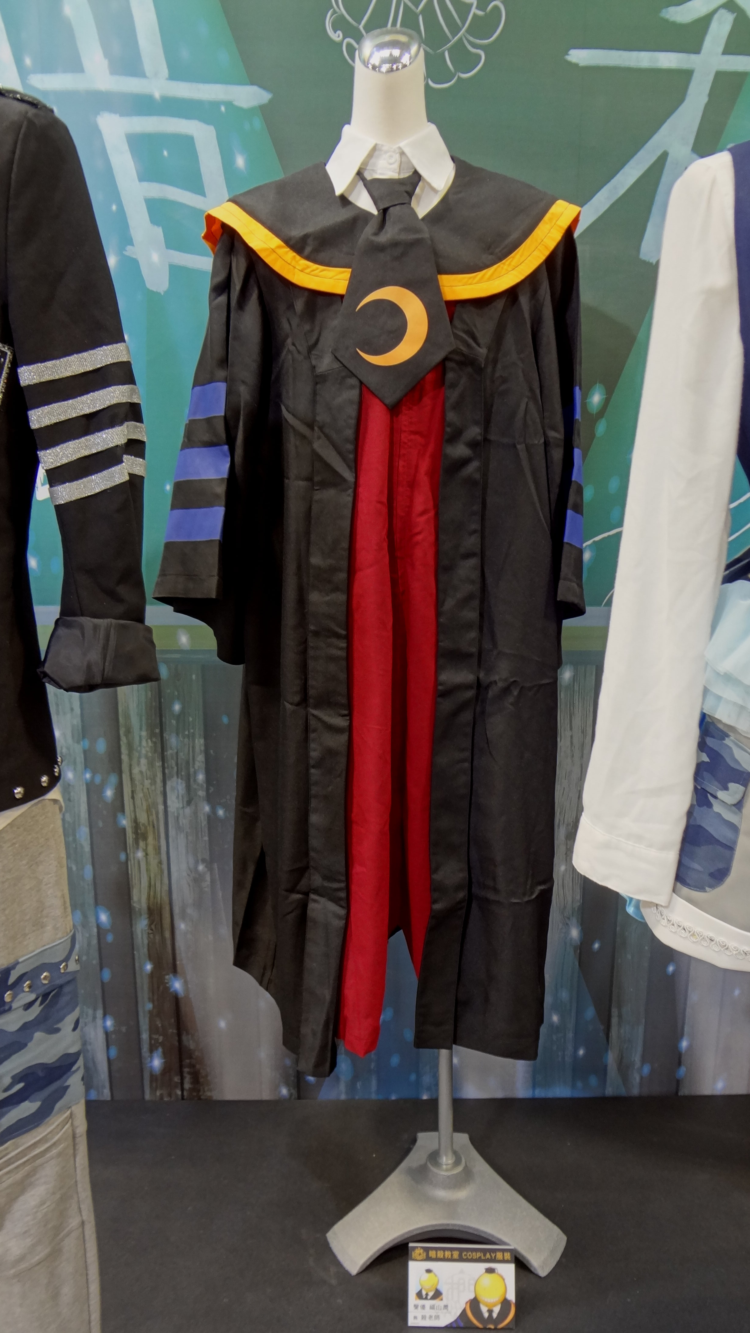 動漫爭艷嘉年華展區《暗殺教室》主題館，《暗殺教室》「畢業的時間」殺老師舞台表演服。